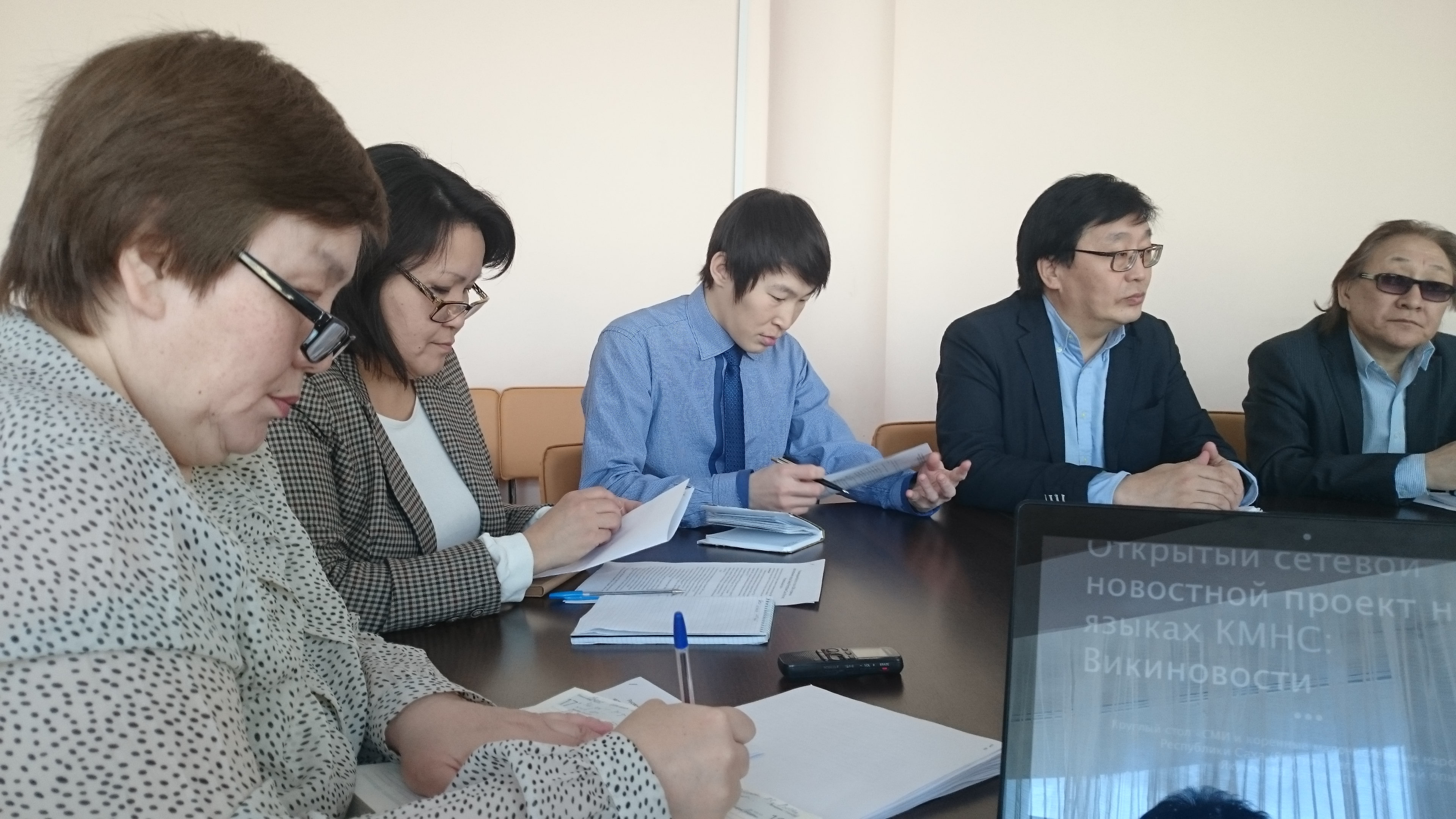 Круглый стол «СМИ и коренные малочисленные народы Севера Республики Саха (Якутия): Региональный опыт». 16 марта 2016 года. Центр Кулаковского. Саха тыла: «Иһитиннэрэр-биллэрэр эйгэ уонна олохтоох аҕыйах ахсааннаах омуктар Саха Өрөспүүбүлүкэтигэр алтыһыылара» төгүрүк остуол